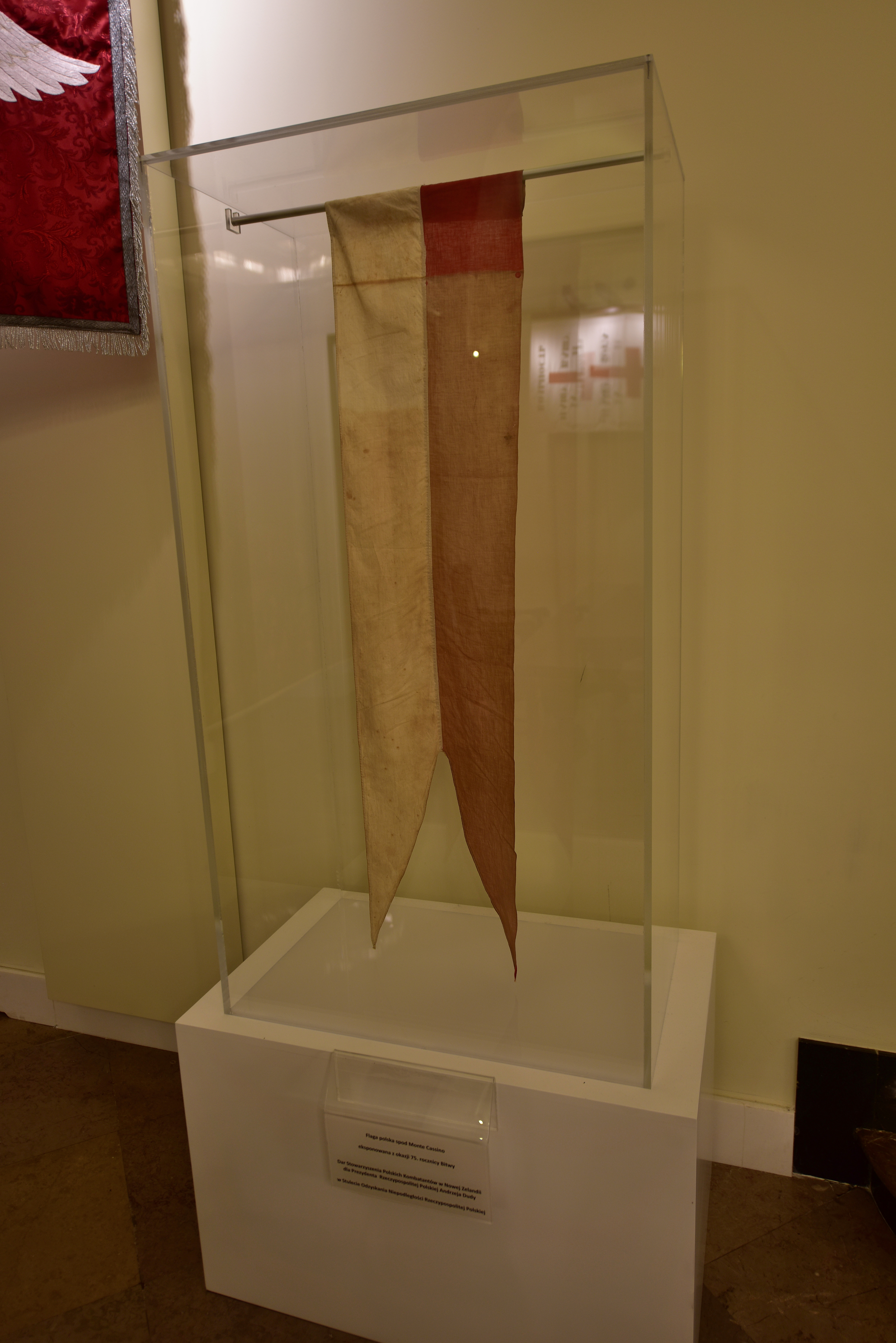 Flaga polska spod Monte Cassino eksponowana w Pałacu Prezydenckim z okazji 75. rocznicy Bitwy. Dar Stowarzyszenia Polskich Kombatantów w Nowej Zelandii dla Prezydenta RP